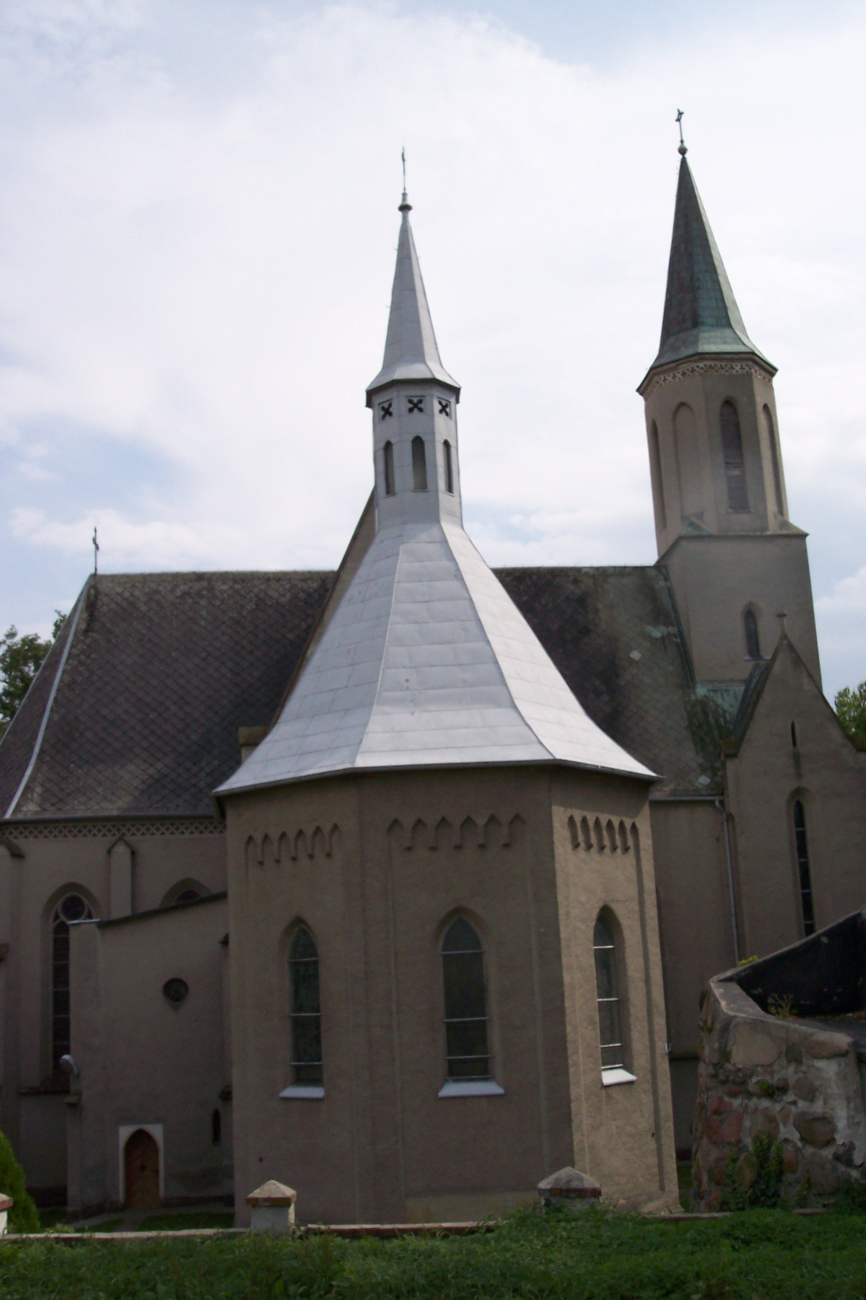 Kościół pątniczy p.w. Nawiedzenia NMP w Ujeździe